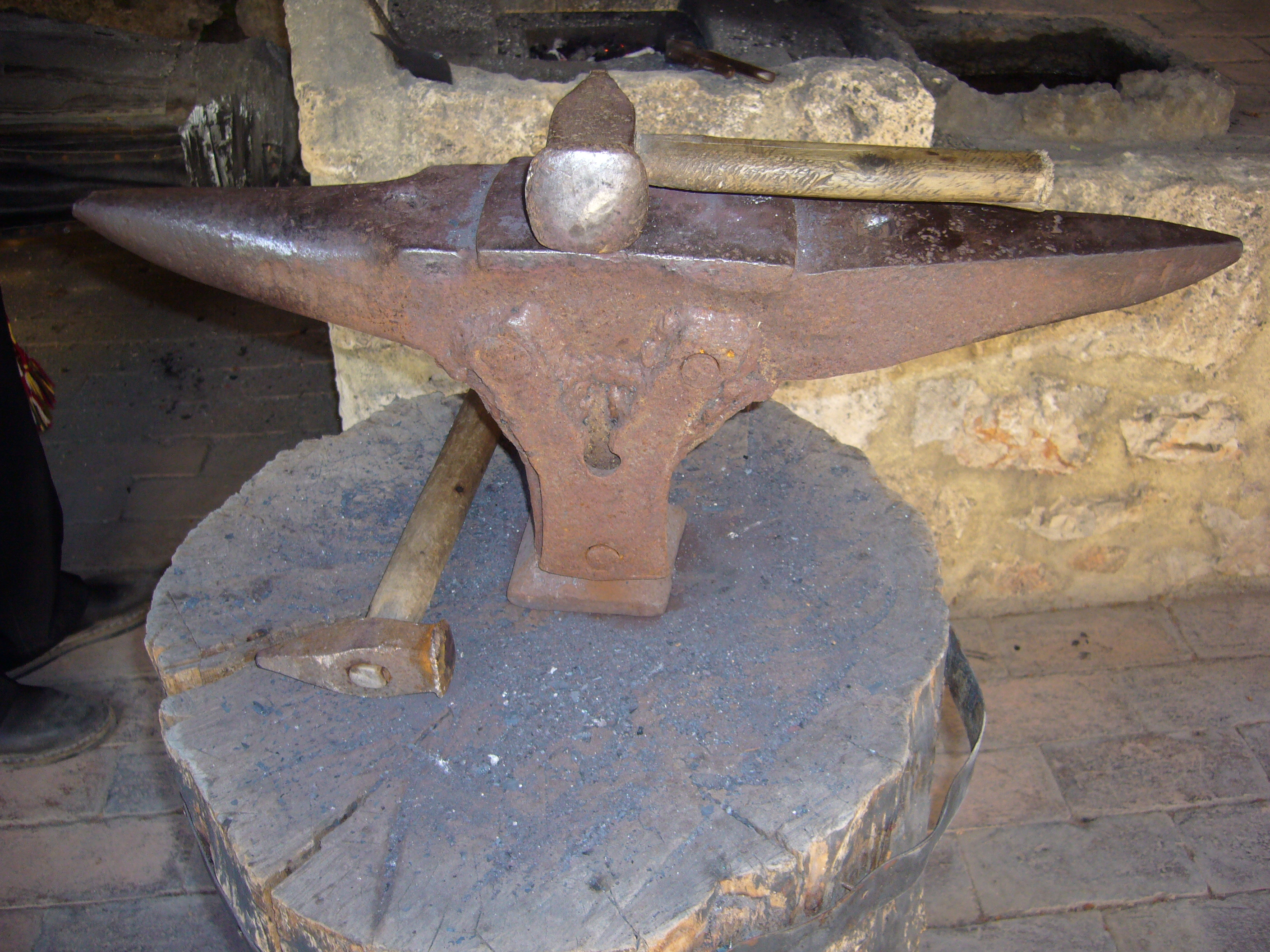 Enclume et marteau, écomusée du parc national de Krka, Croatie